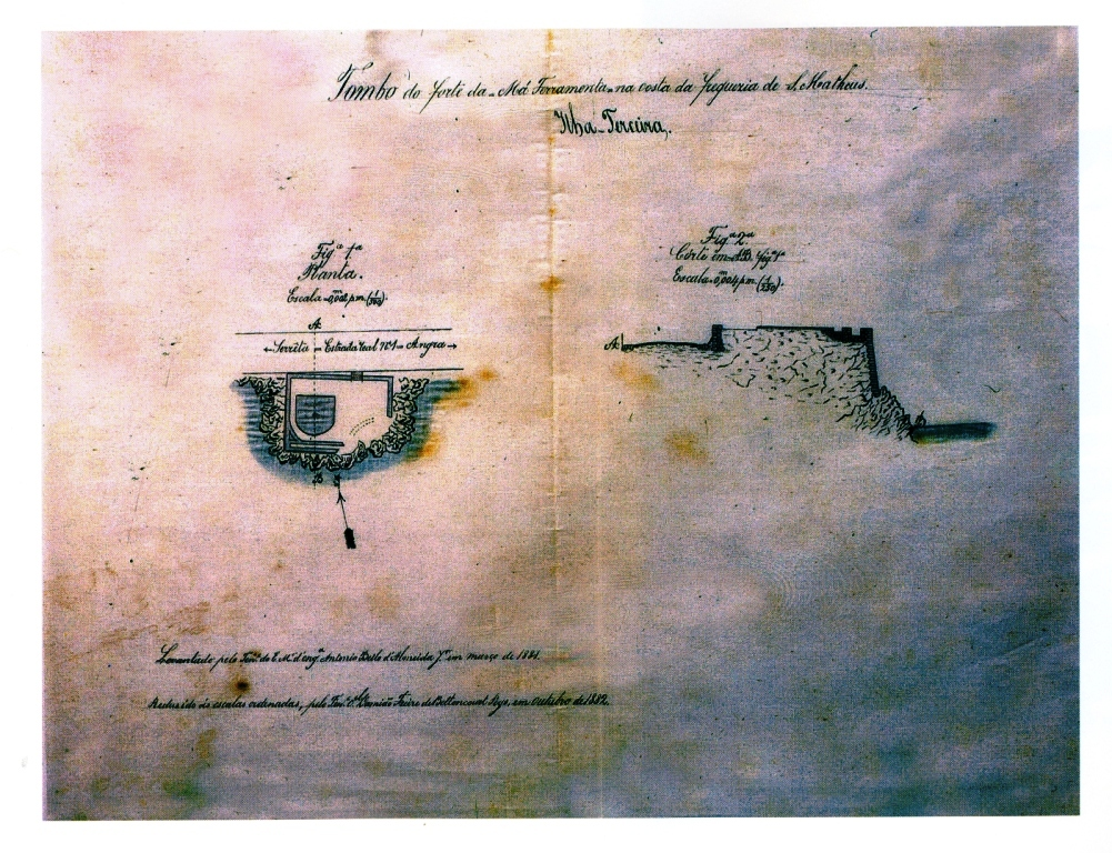 "Tombo do Forte da Má Ferramenta, na costa da freguesia de S. Matheus", Ilha Terceira (Açores), Portugal.